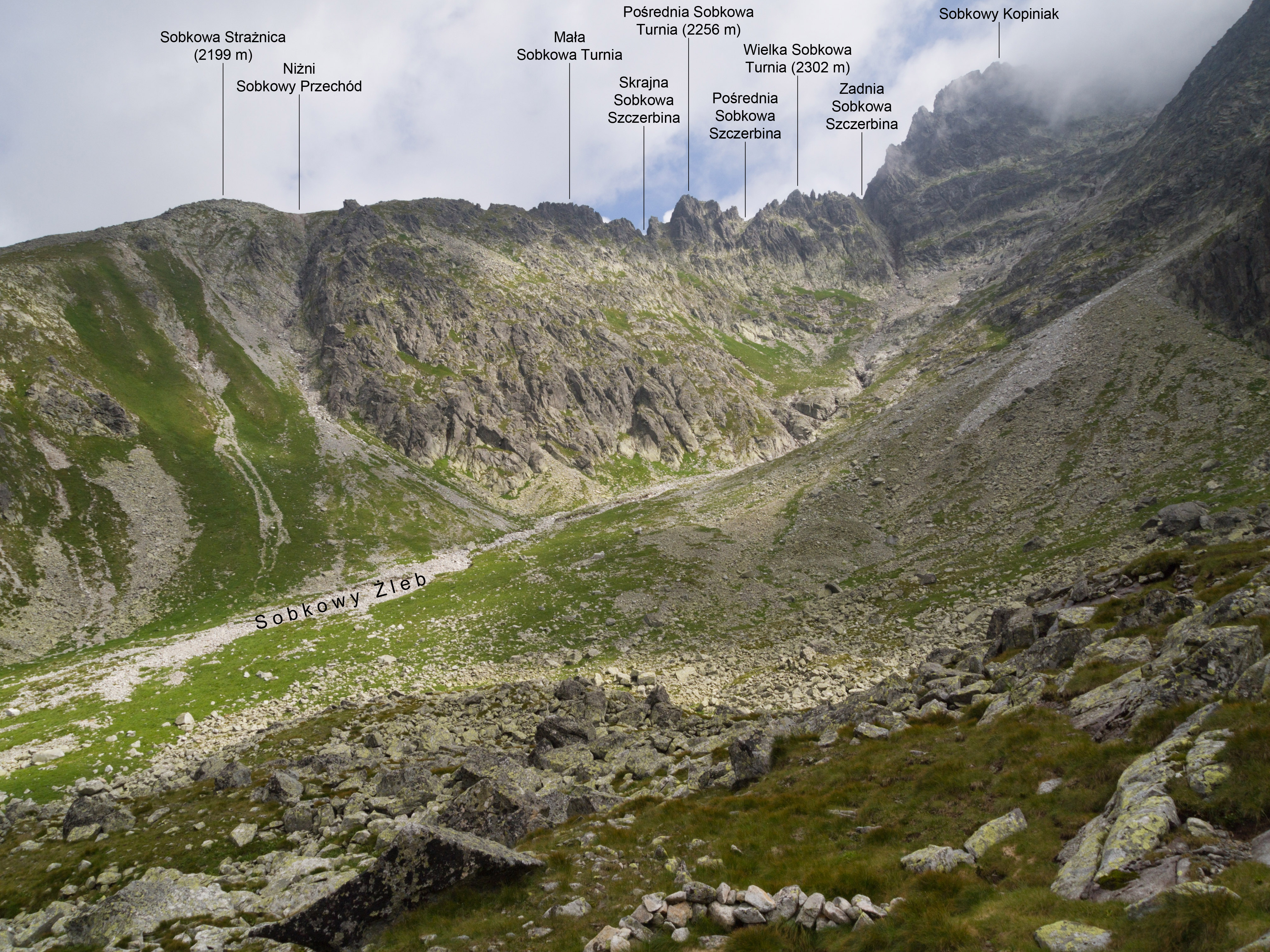 Fragment Sobkowej Grani (podpisane obiekty).